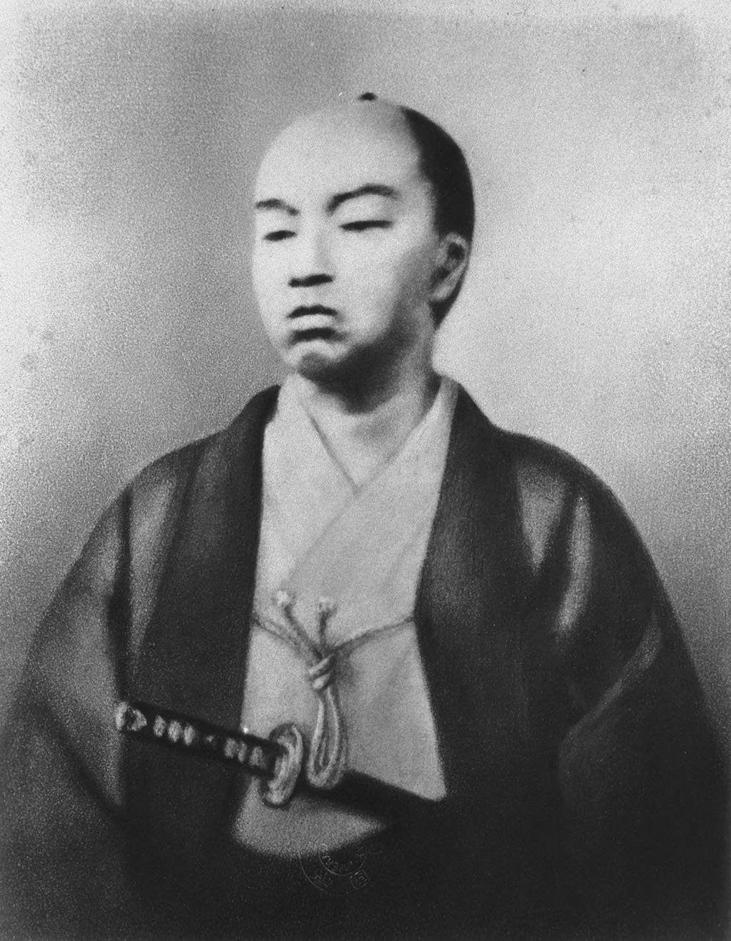 Portrait of Shimazu Hisamitsu (島津久光, 1817 – 1887)